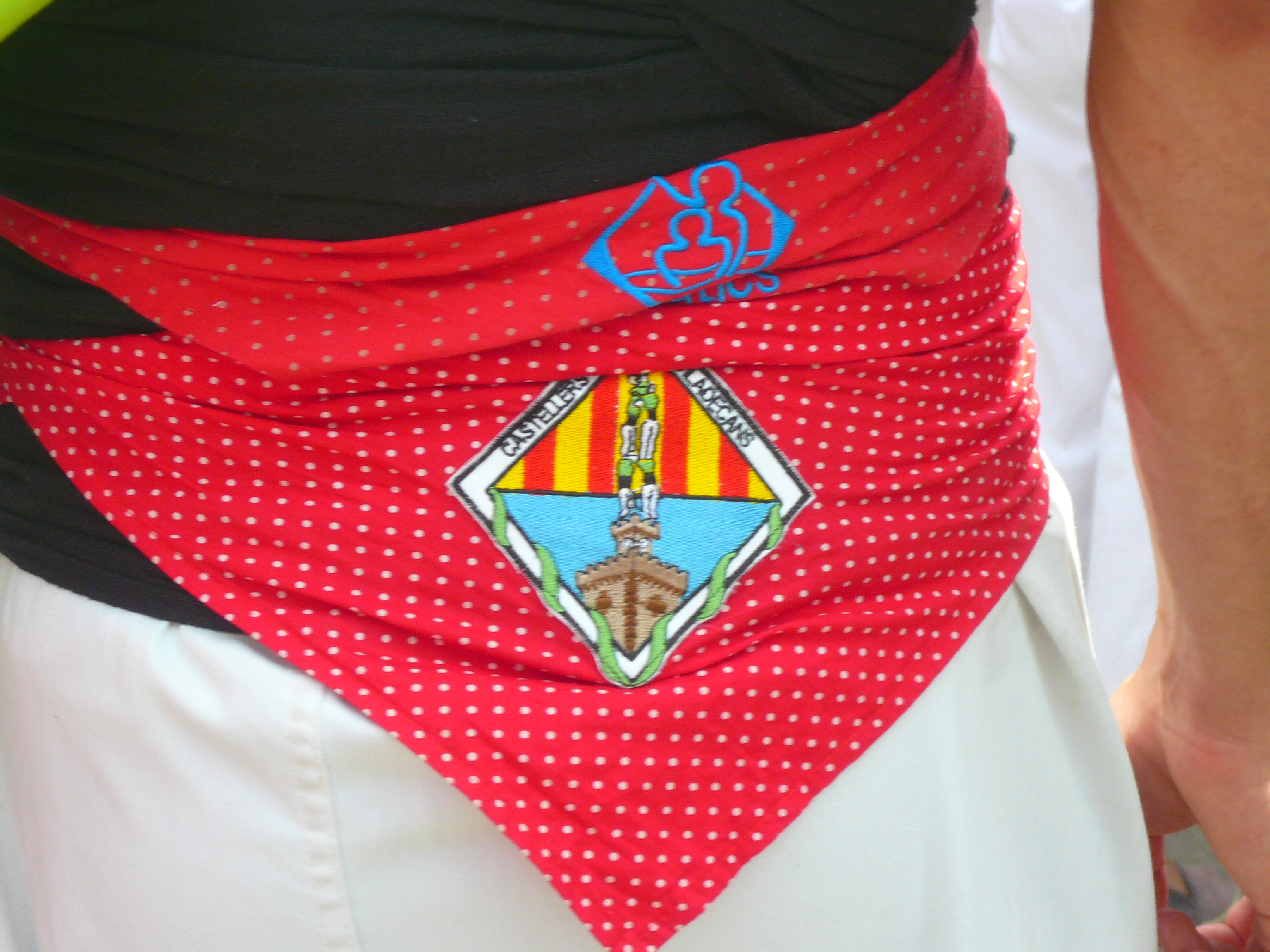 Mocador amb l'escut dels castellers de Viladecans. Diada castellera de les festes de primavera del 2014 a Sant Feliu de Llobregat. Hi actuaven els Castellers de Sant Feliu (camisa rosa), els Castellers de Viladecans (camisa verda) i els Castellers de Santa Coloma (camisa blau cel).